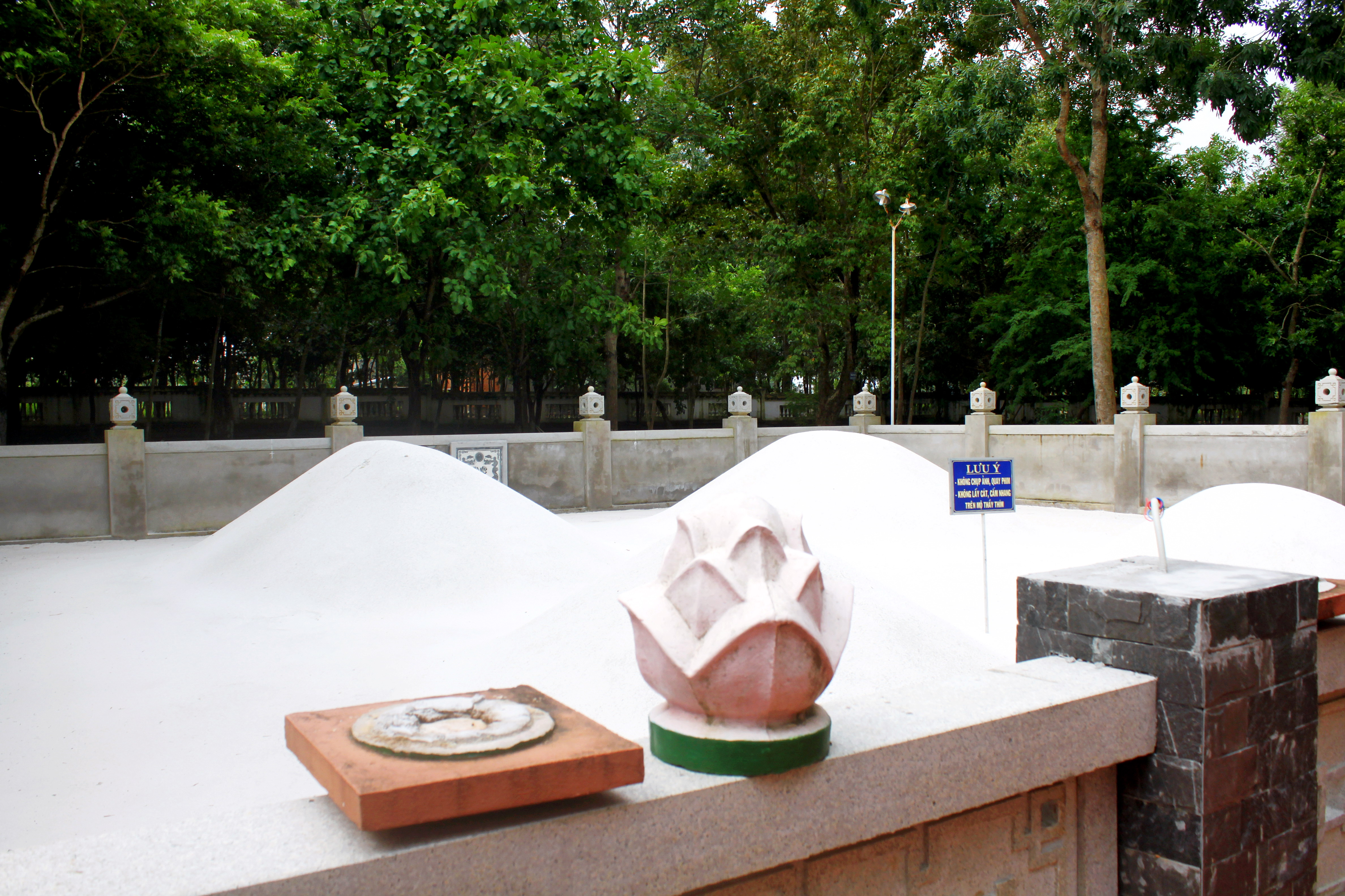 Khu mộ Thầy Thím ở thị xã La Gi, tỉnh Bình Thuận, Việt Nam.